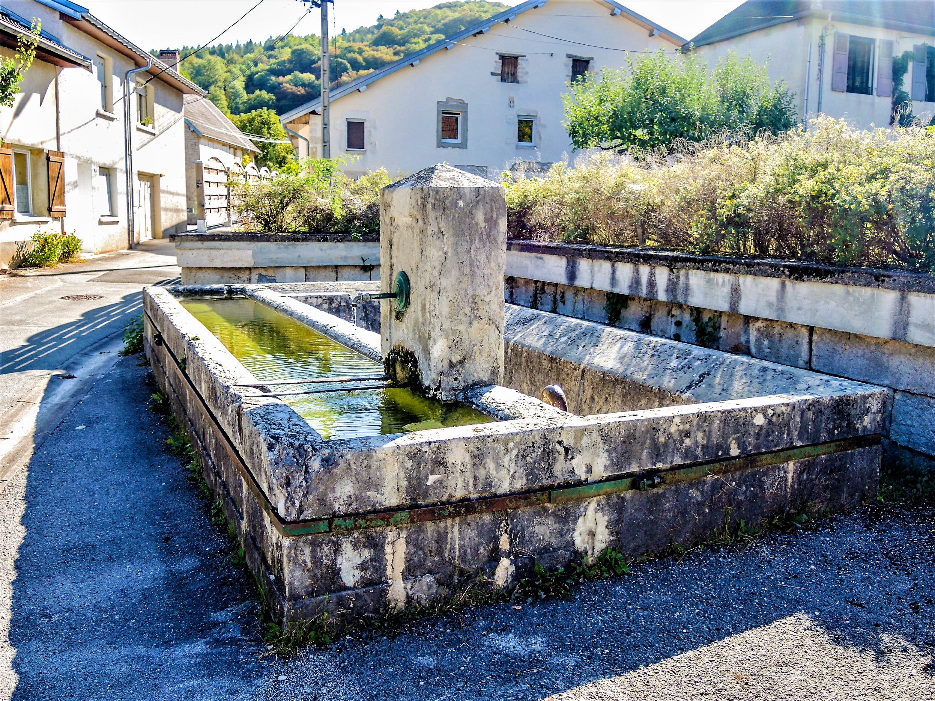 Fontaine-lavoir